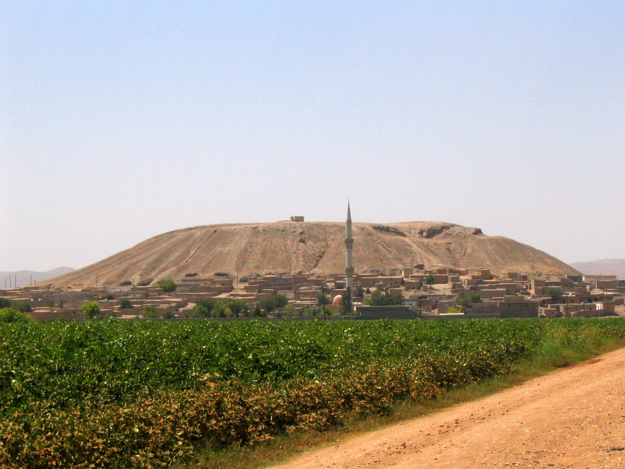 Sultantepe, assyrischer Siedlungshügel bei Şanlıurfa, Südosttürkei